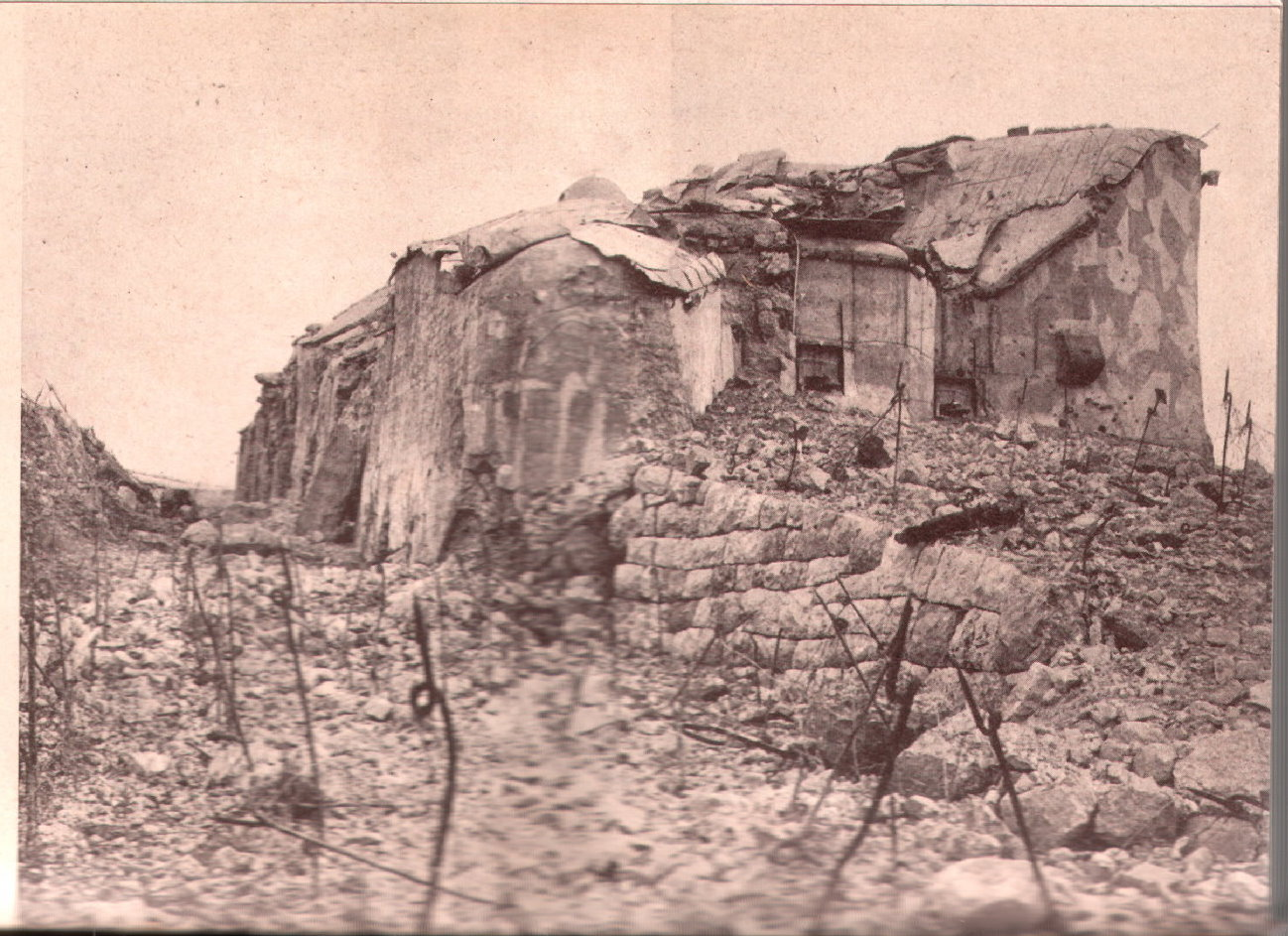 Fort Lusern (Werk Lusern)